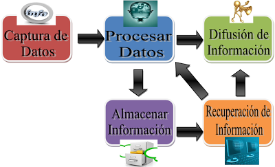 •Capturar datos: El SIG captura datos de diversas fuentes internas y externas de la organización. •Procesar datos: Los datos capturados se procesan para convertirlos en información necesaria. •Almacenar la información: El SIG almacena los datos procesados ​​o sin procesar para su utilización en el futuro. Si alguna información no es inmediatamente necesaria, se almacena como una organización de registros, para su posterior uso. •Recuperar la Información: El SIG recupera la información de sus almacenes de datos a medida que es requerida por varios usuarios. •Difusión de la información: La información, que es el producto Final del proceso realizado por el SIG, se difunde a los usuarios de la organización. Esta difusión es periódica.